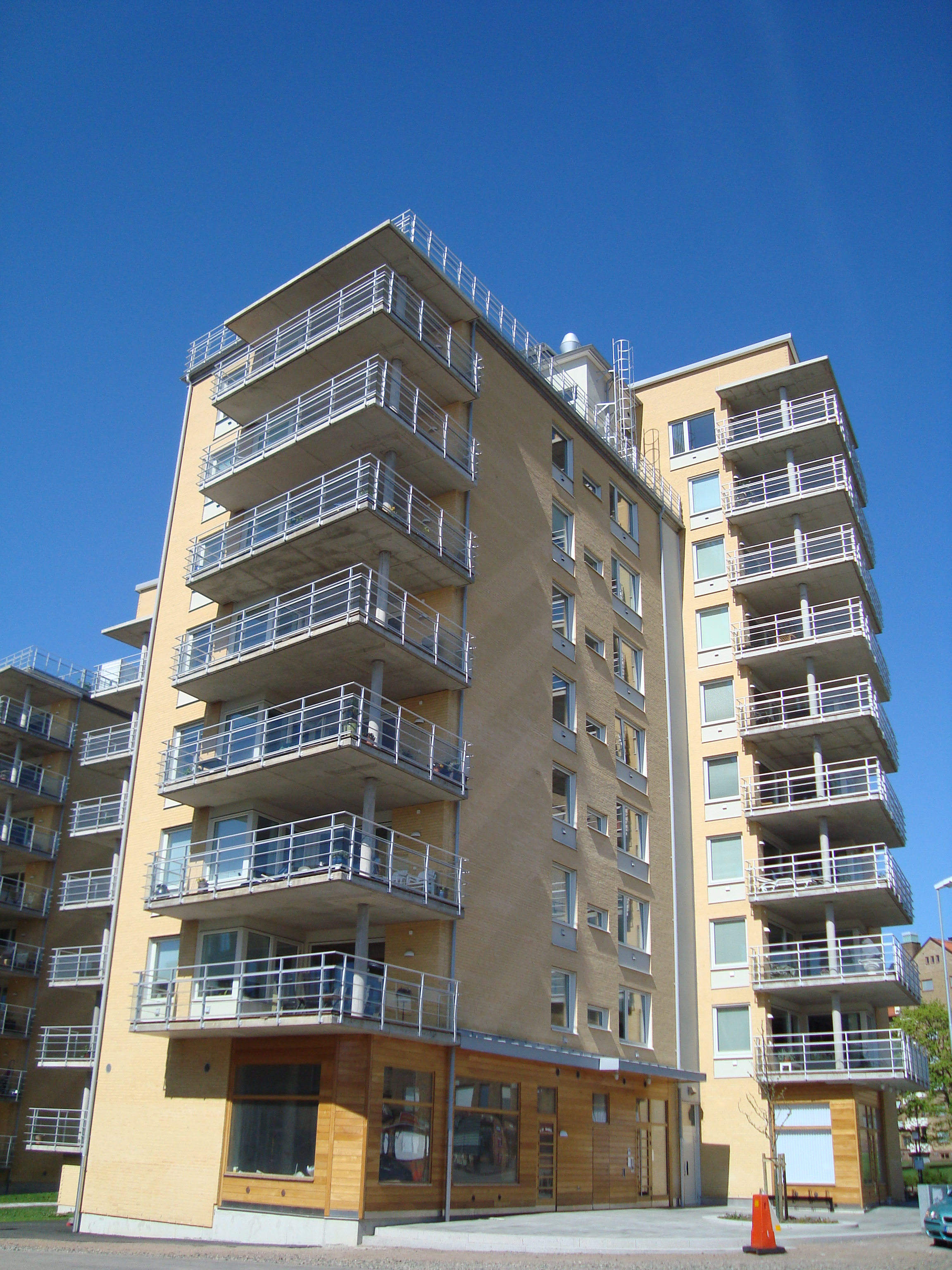 Seniorboendet på Slottshöjden i Helsingborg.